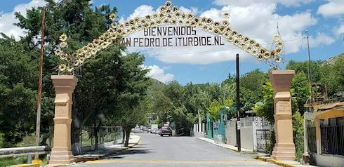 Arco de Bienvenida ( entrada desde Linares rumbo a Galeana ) - Iturbide, Nuevo León, México